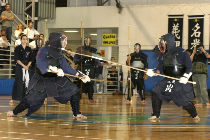 Naginatajutsu no 5° Torneio Brasileiro por equipes de Kobudo, organizado pela Confederação Brasileira de Kobudo